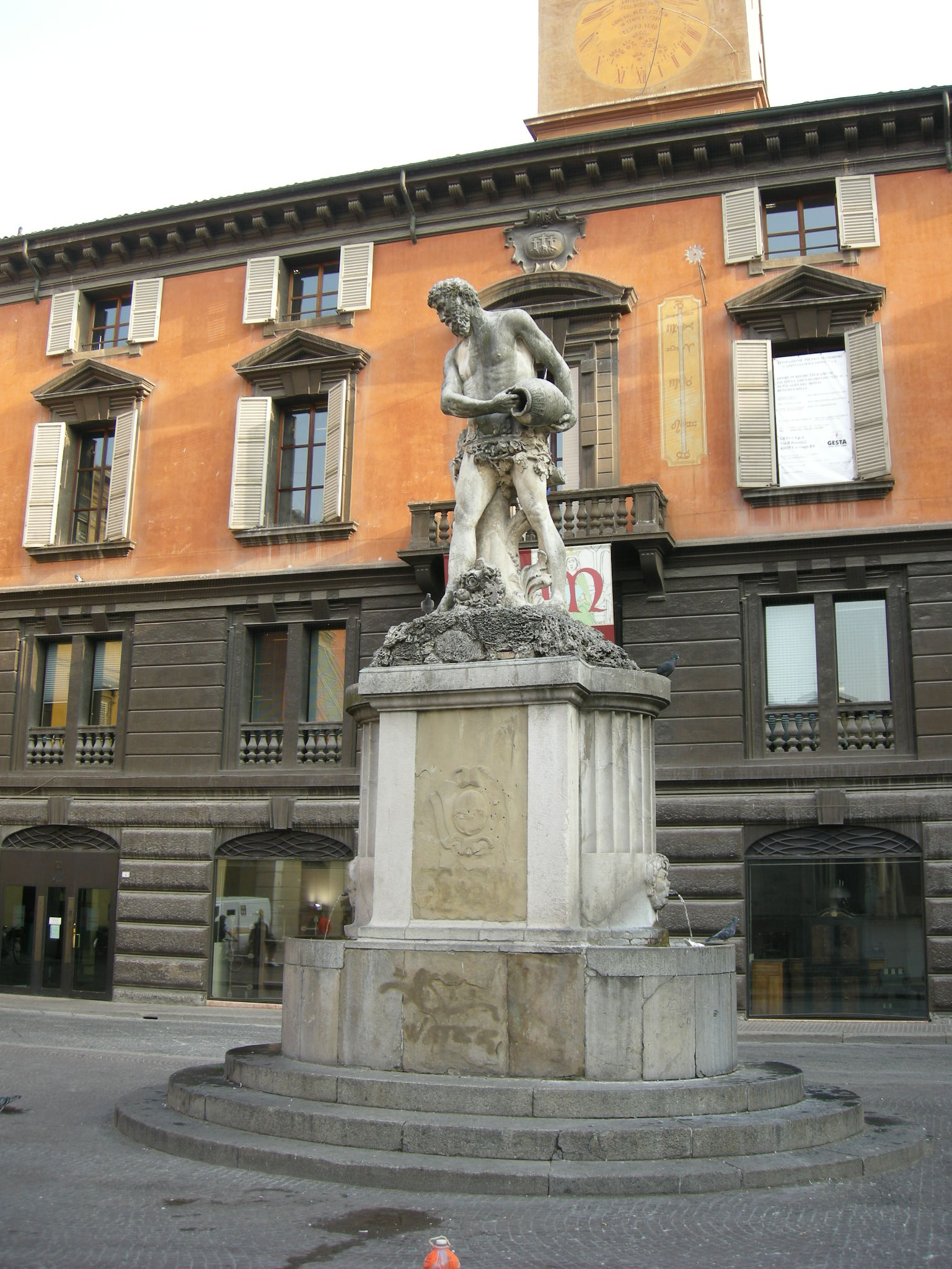 Piazza duomo (Reggio emilia)